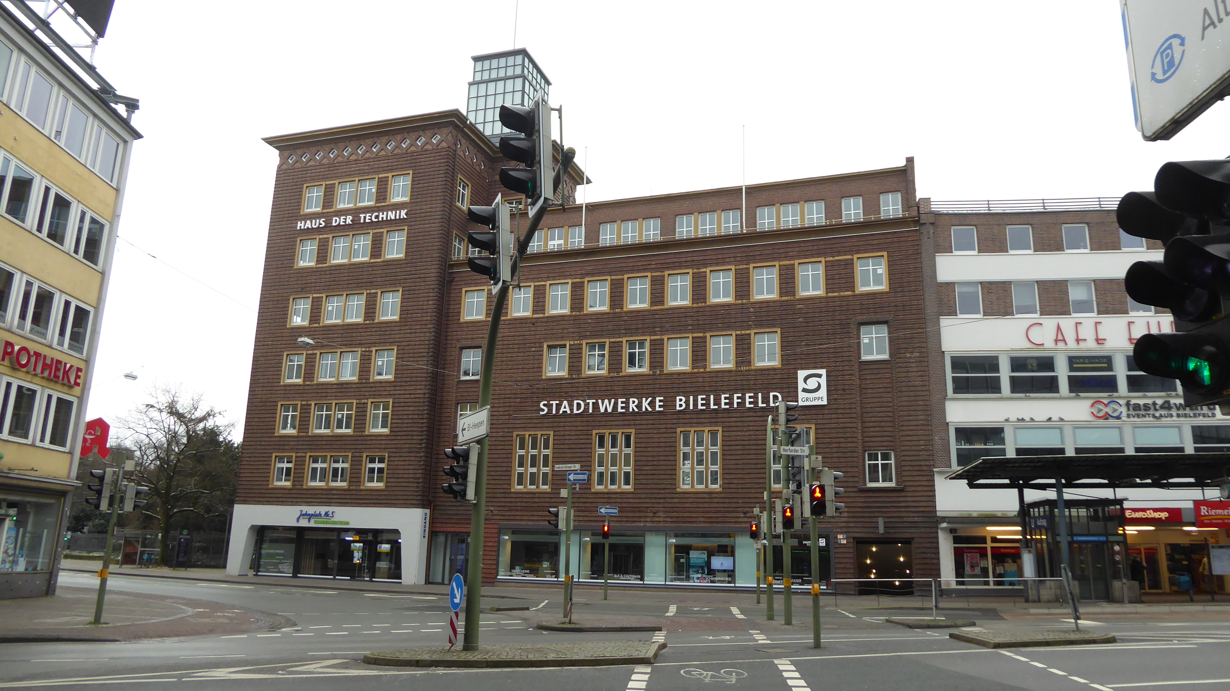 Haus der Technik nach Umbau 2017